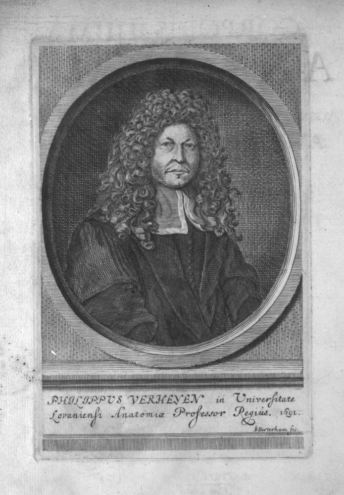 Gravure à l'eau-forte montrant un portrait de Philip Verheyen professeur d'anatomie à l'Université de Louvain, 1691, face à la page de titre de Corporis humani anatomia de Philip Verheyen